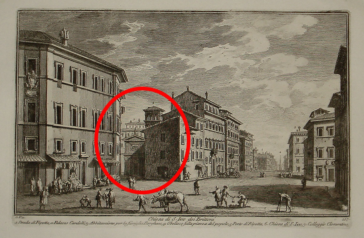 L'ancienne église Saint-Yves des Bretons de Rome (Sant'Ivo dei Bretoni), avant sa destruction puis sa reconstruction au XIX° siècle. Giuseppe VASI (1710-1782). L'église est marquée par un cercle rouge.